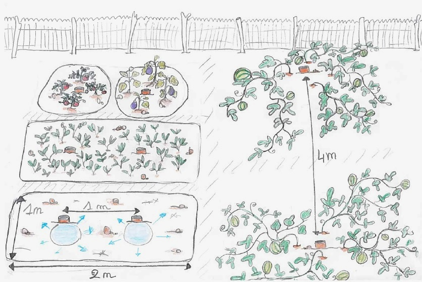 Un schéma montrant l'espacement entre les jarres selon les types de cultures